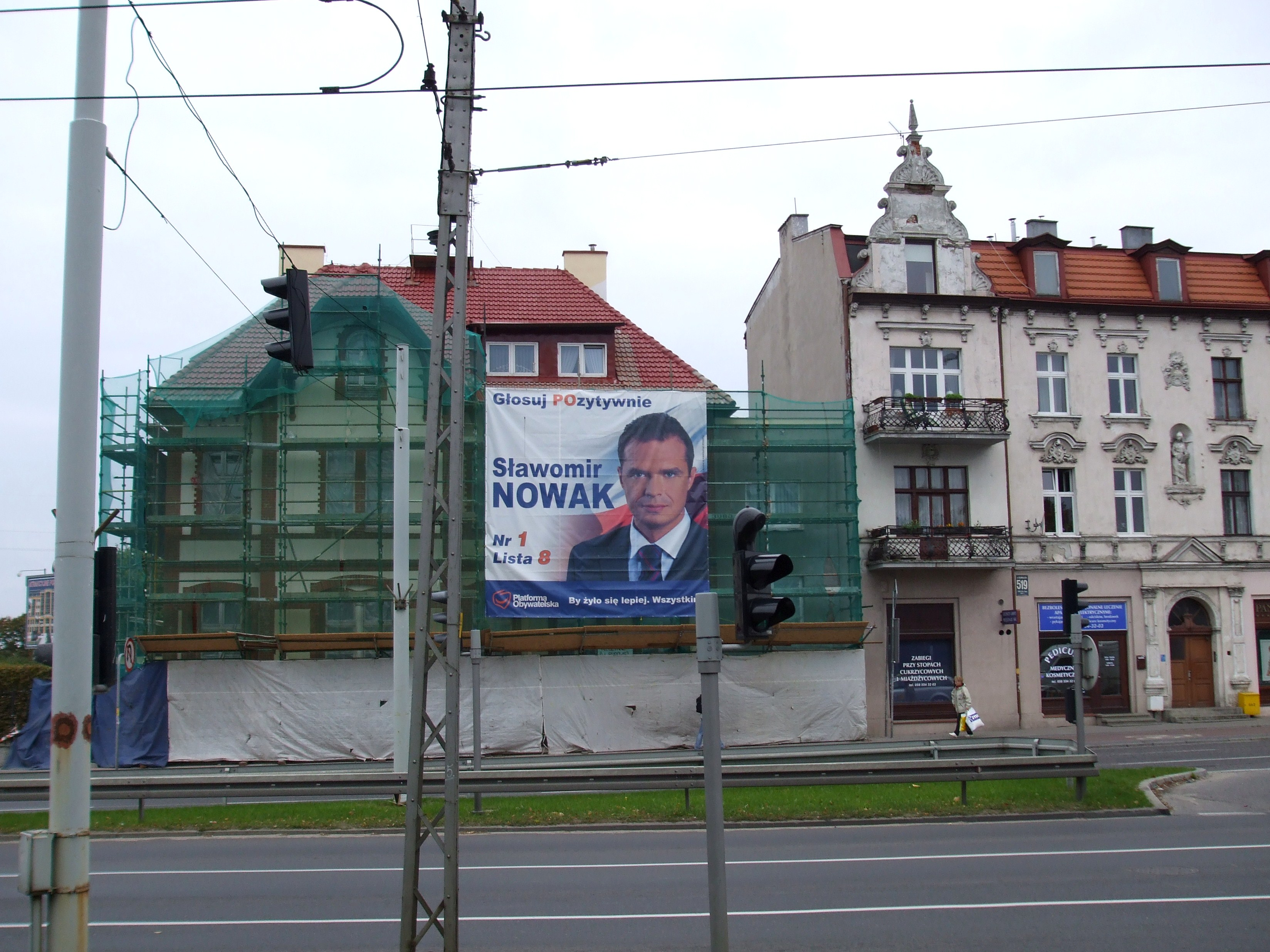 Gdańsk Oliwa, al. Grunwaldzka 519 i 521 (po lewej).